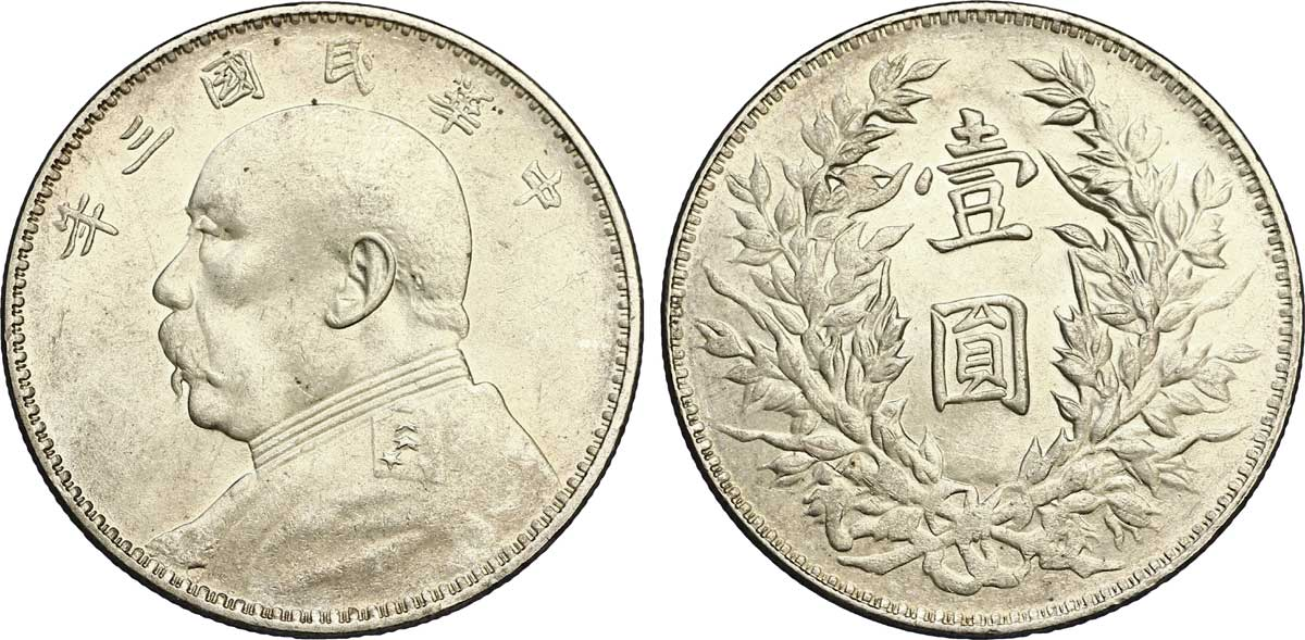 CHINE, 1 Yuan à l'effigie du Président Yuan Shikai, 1914. Yuan Shikai (1859-1916) est un militaire et homme politique chinois. Homme fort sous le régime impérial des Qing , il négocie avec les révolutionnaires. Ainsi en 1912, il succède à Sun Yat-sen en devenant président de la République de Chine. Grâce à son contrôle sur l’armée, il instaure un régime autocratique. Le 12 décembre 1915, il s’autoproclame Grand Empereur de Chine mais isolé doit abandonner le pouvoir en mars 1916. Il meure d’une hémorragie en juin 1916.